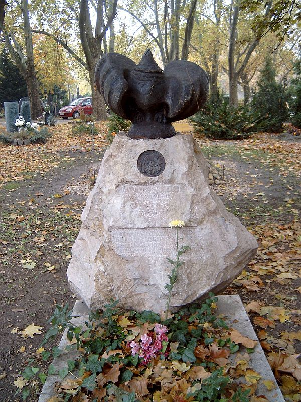 Várady Sándor (Miskolc, 1920. május 29.–Budapest, 2000. április 7.) szobrász sírja Budapesten. Kerepesi temető: 42/1-A-32.